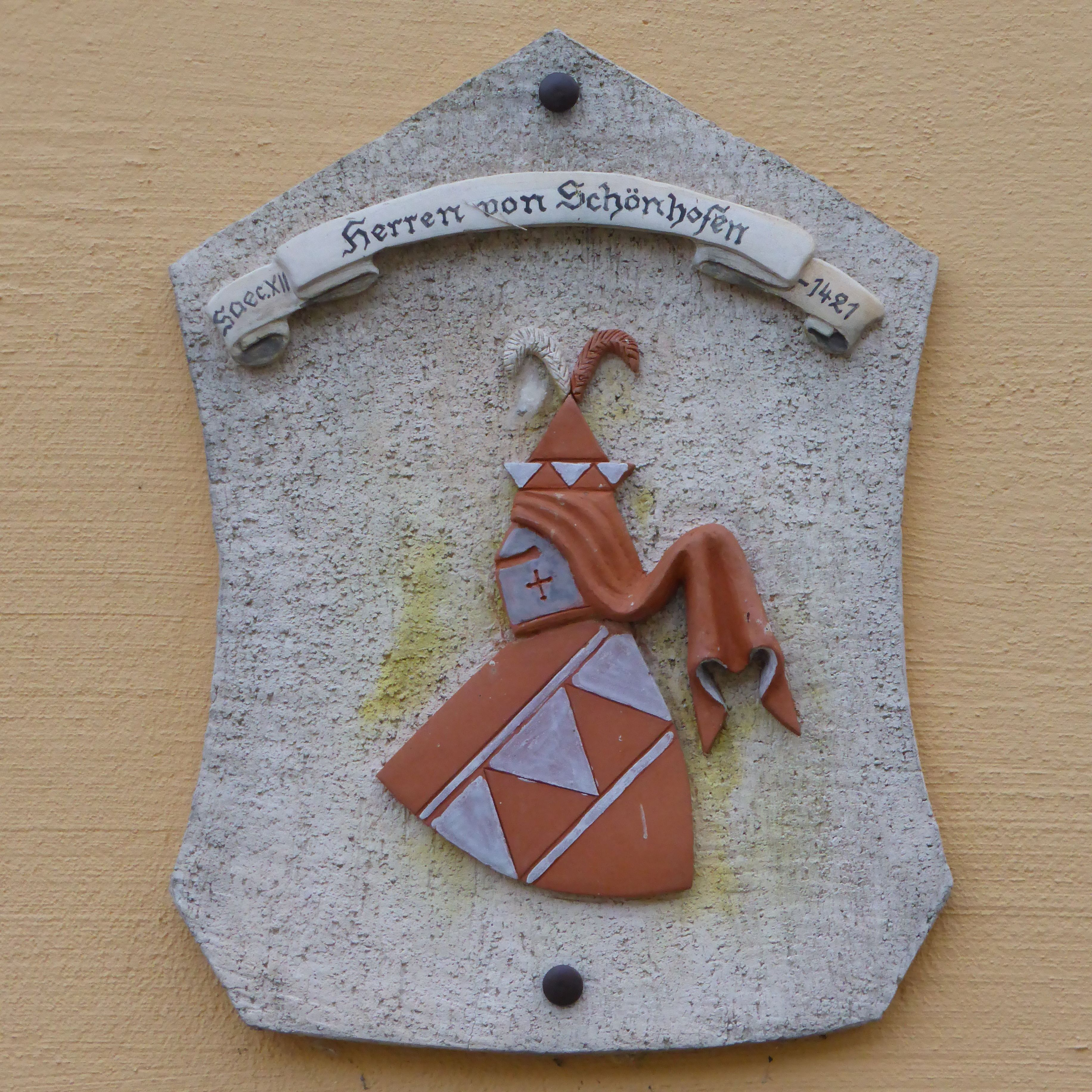 Schönhofen, St. Johannes Baptist, Wappen der Herren von Schönhofen